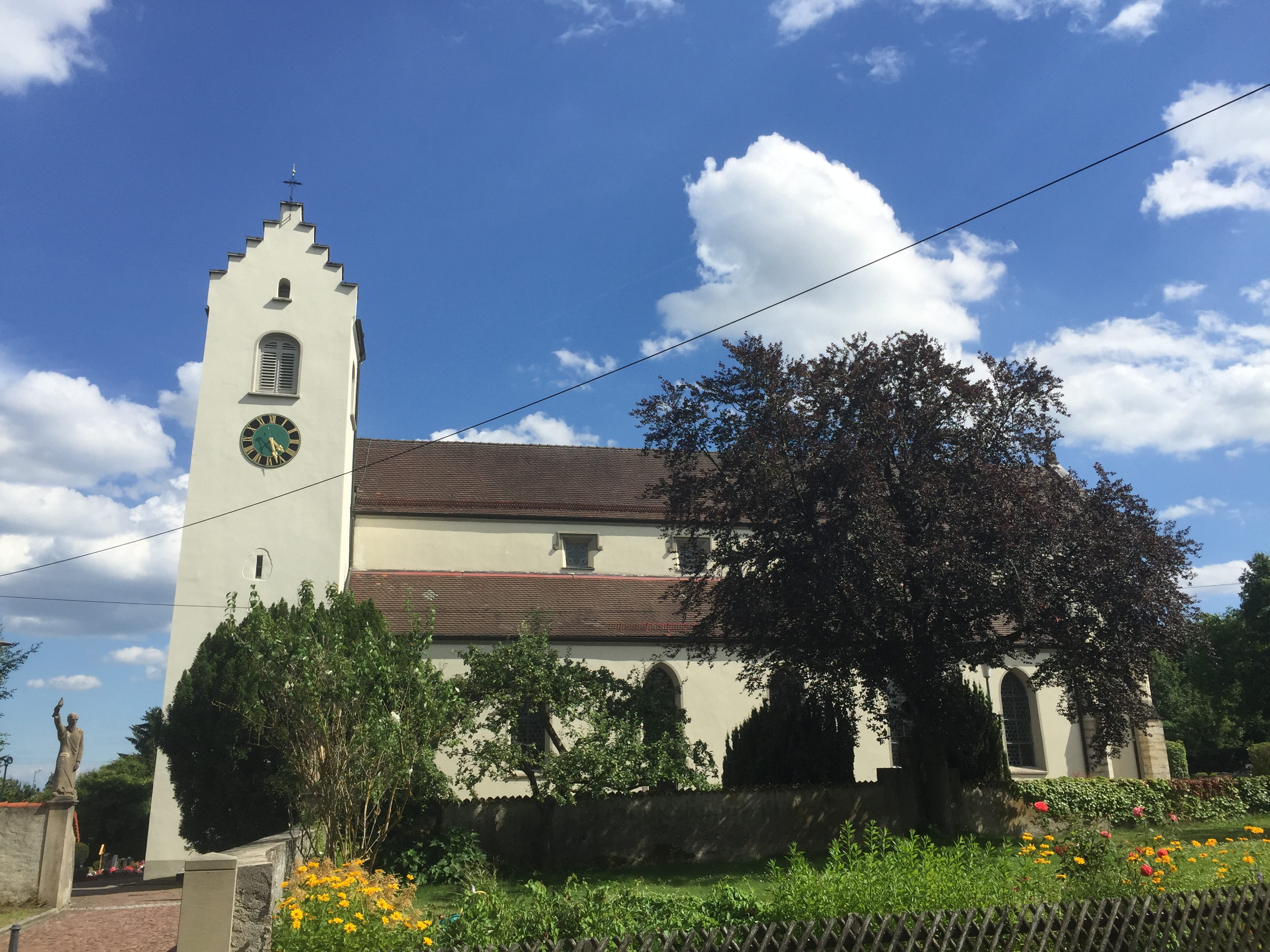 St. Peter und Paul im Ortsteil Mühlhausen von Mühlhausen-Ehingen.